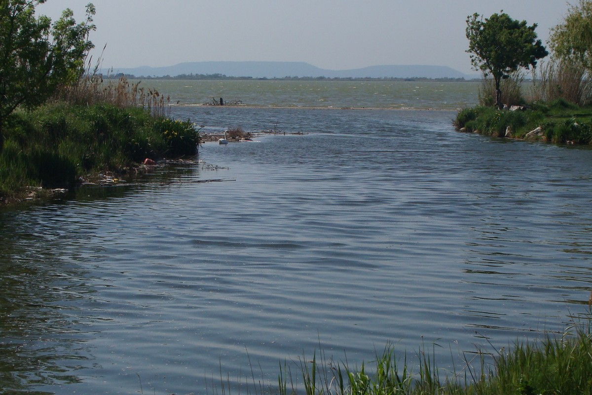 L'embouchure de la Cadière, à Marignane (Bouches-du-Rhône). L'étendue d'eau au second plan est l'étang de Bolmon. Au fond, le cordon du Jaï.